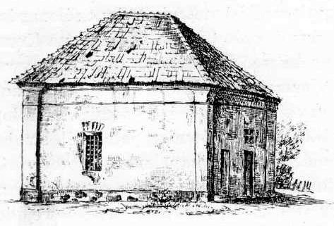 Ilustracja Encyklopedii staropolskiej T.2 335 - kancelaria ziemi bielskiej w Brańsku